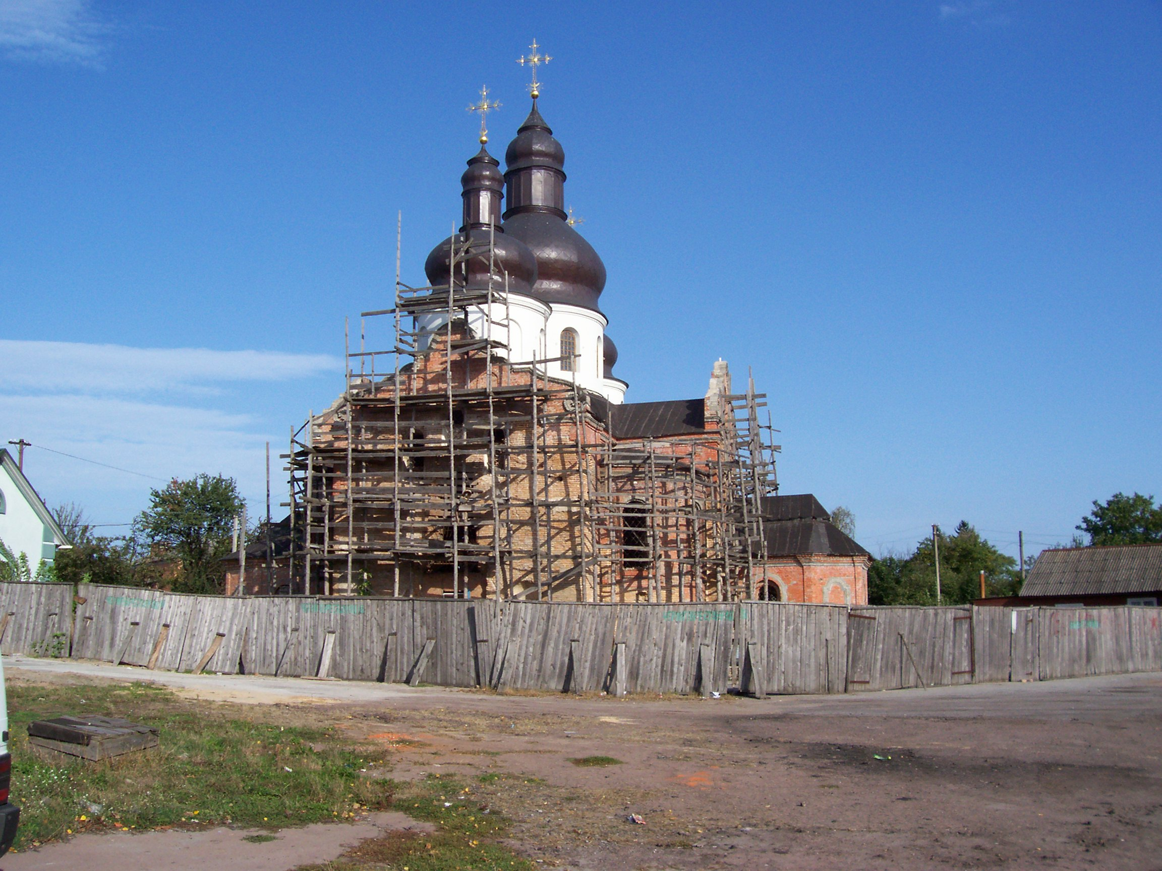 Спасо-Преображенська церква у Ніжині